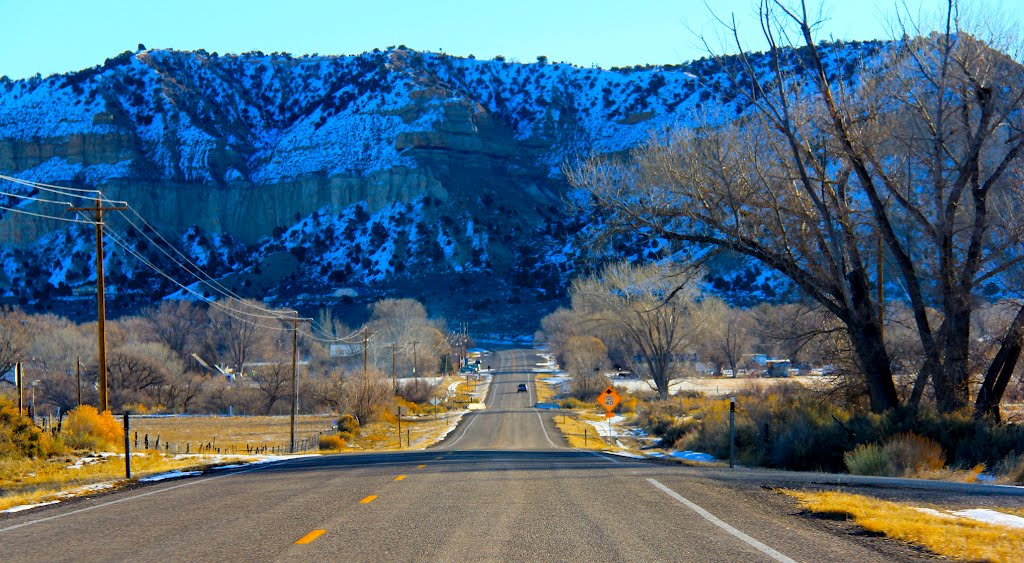 Entrée d'Henrieville, sur l'Utah State Route 12